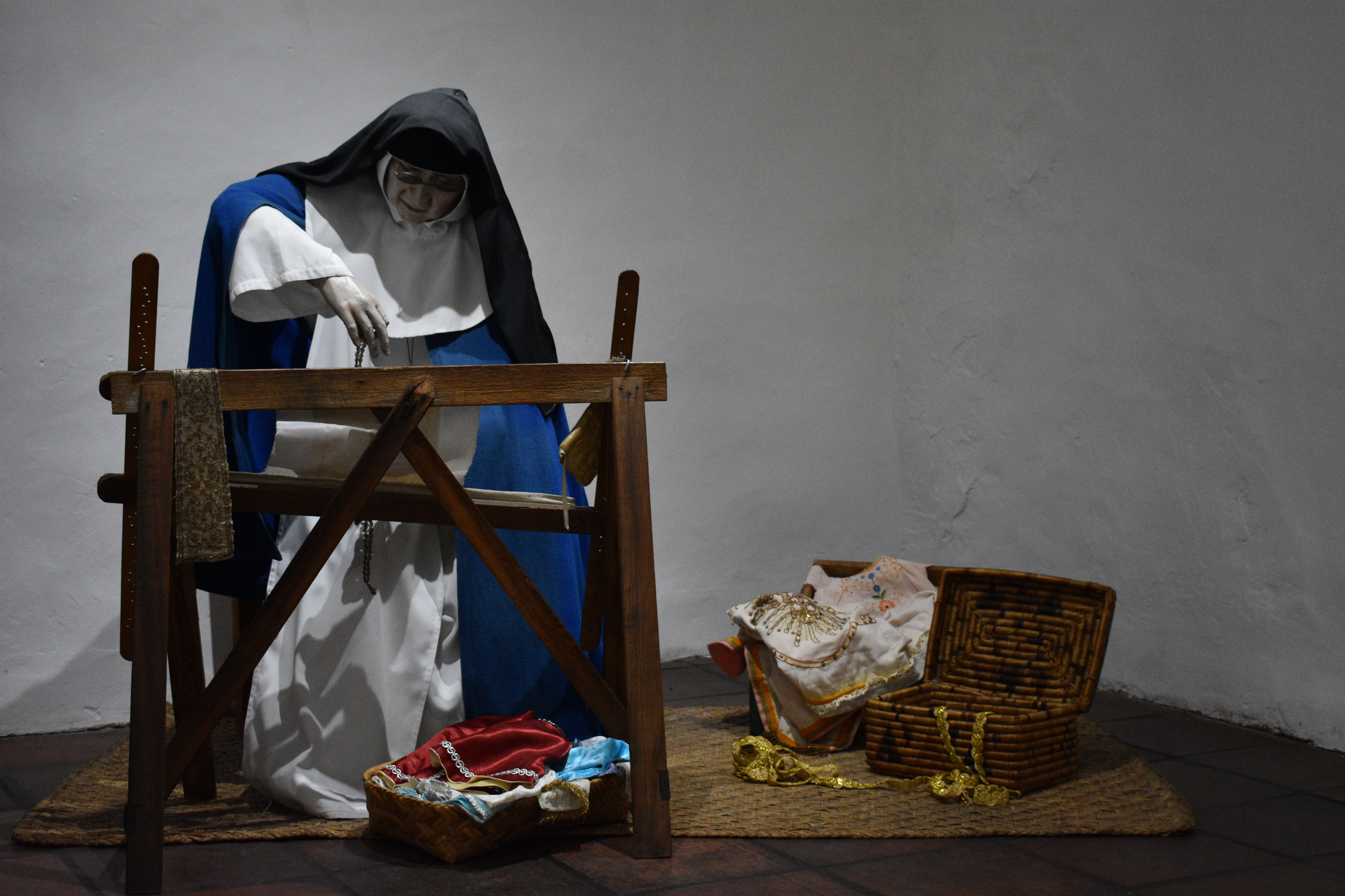 bordados